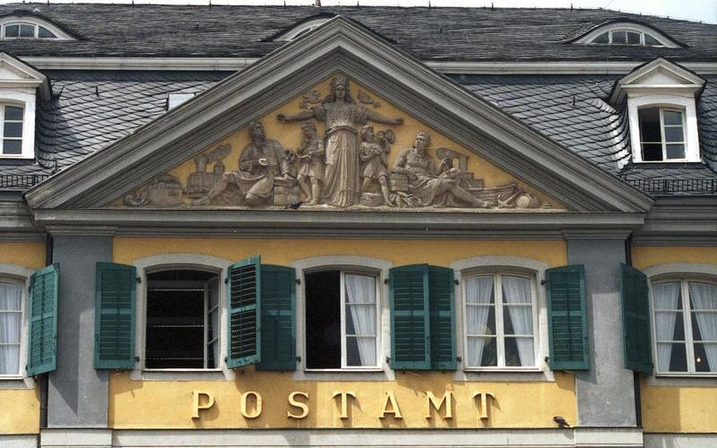 Juni 1988 Bonn, Hauptpostamt am Münsterplatz